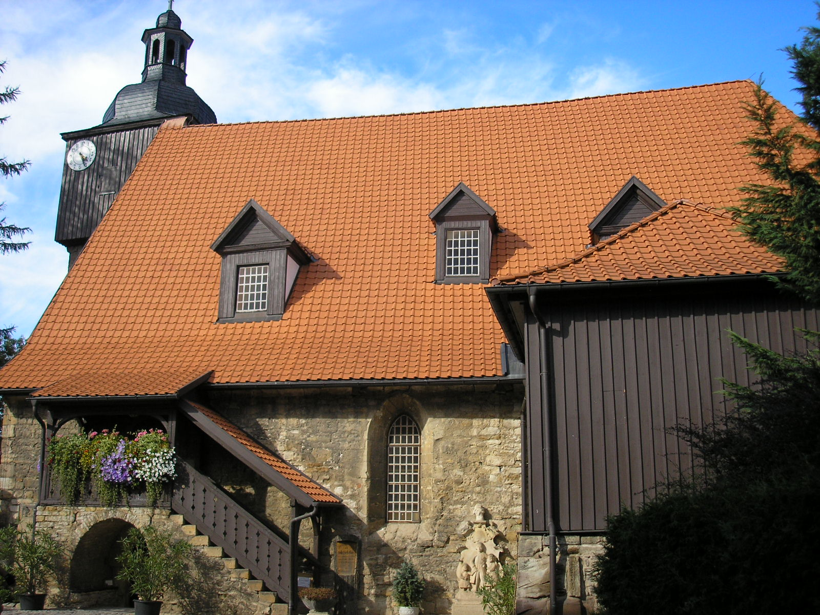 Die Kirche von Dornheim (Ilm-Kreis, Thüringen, Deutschland)